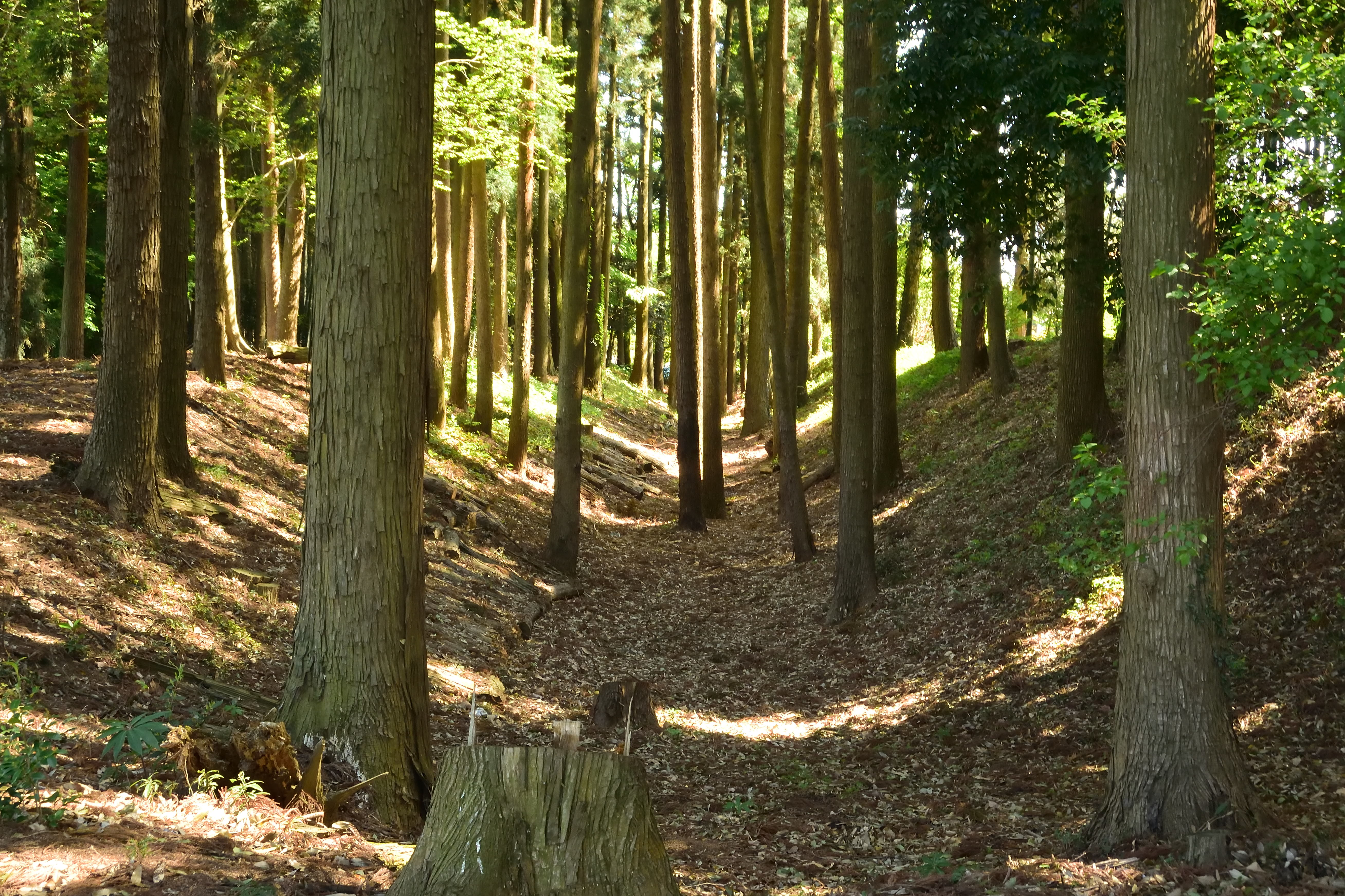 中村城跡空堀